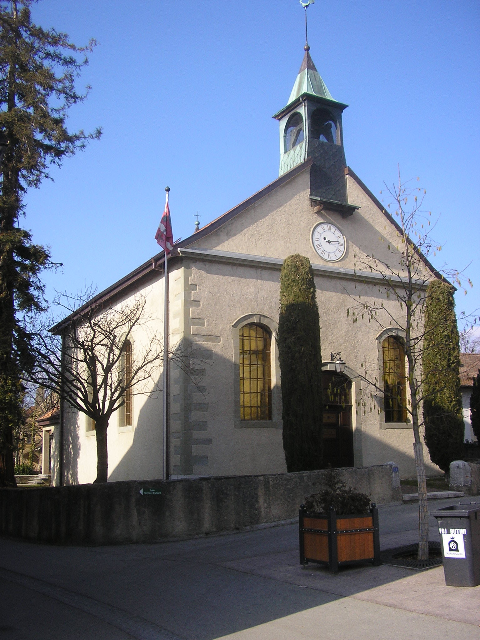 Salle du conseil municipal, commune d'Onex à Genève.